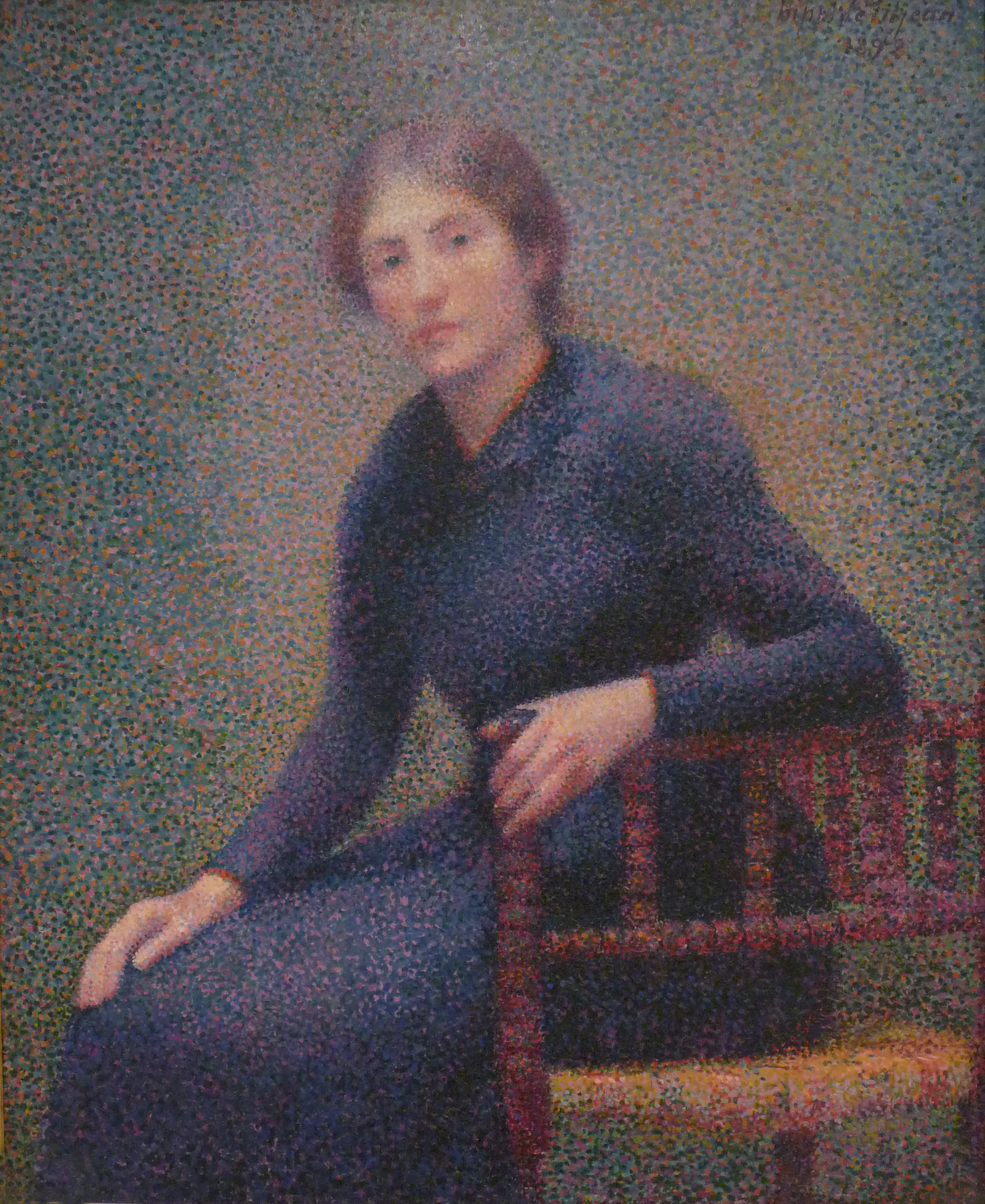 Jeune femme assise. Représente Louis-Claire Chardon qui épousera le peintre en 1904.